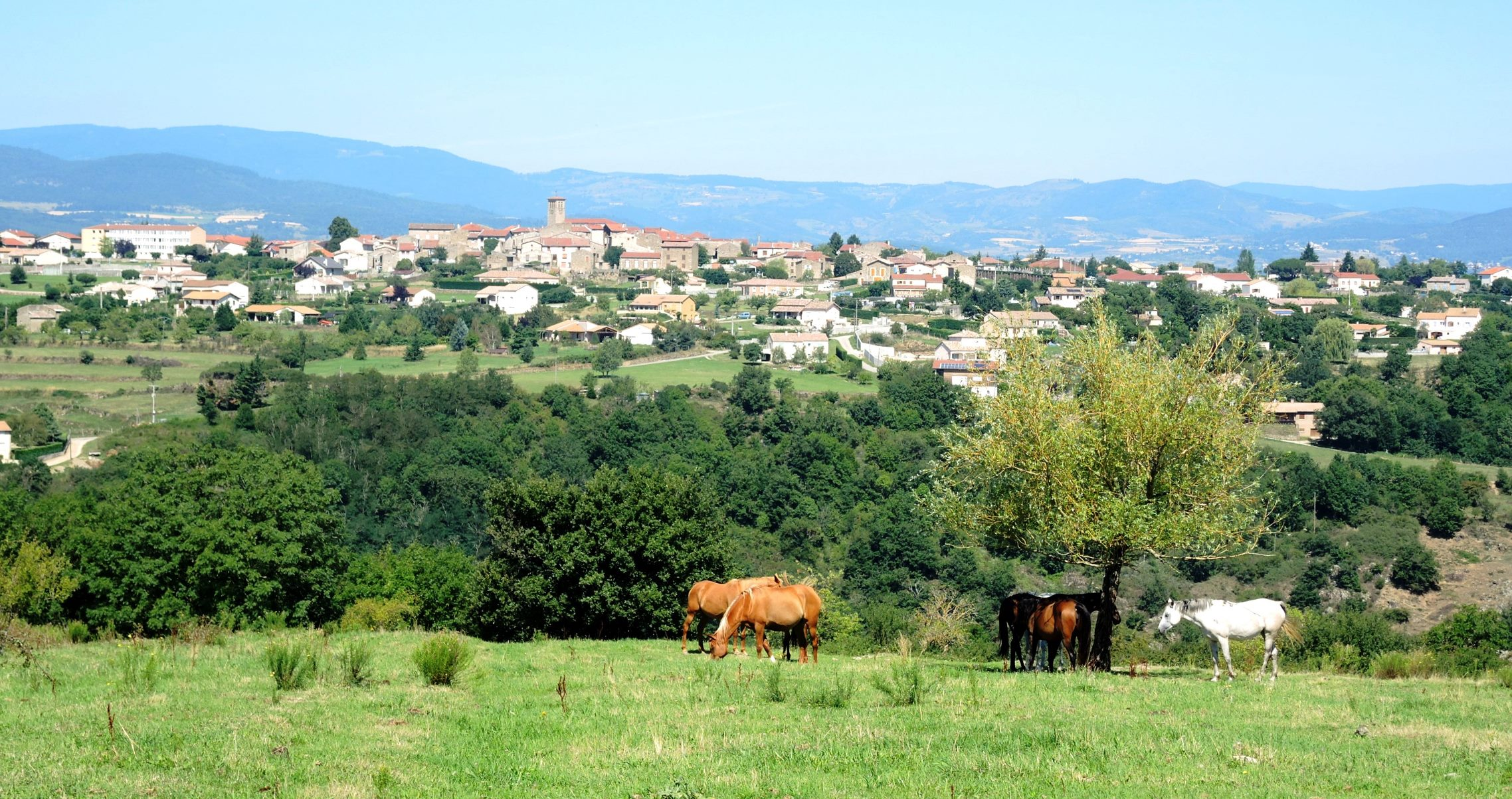 Ardoix vue générale avec chevaux